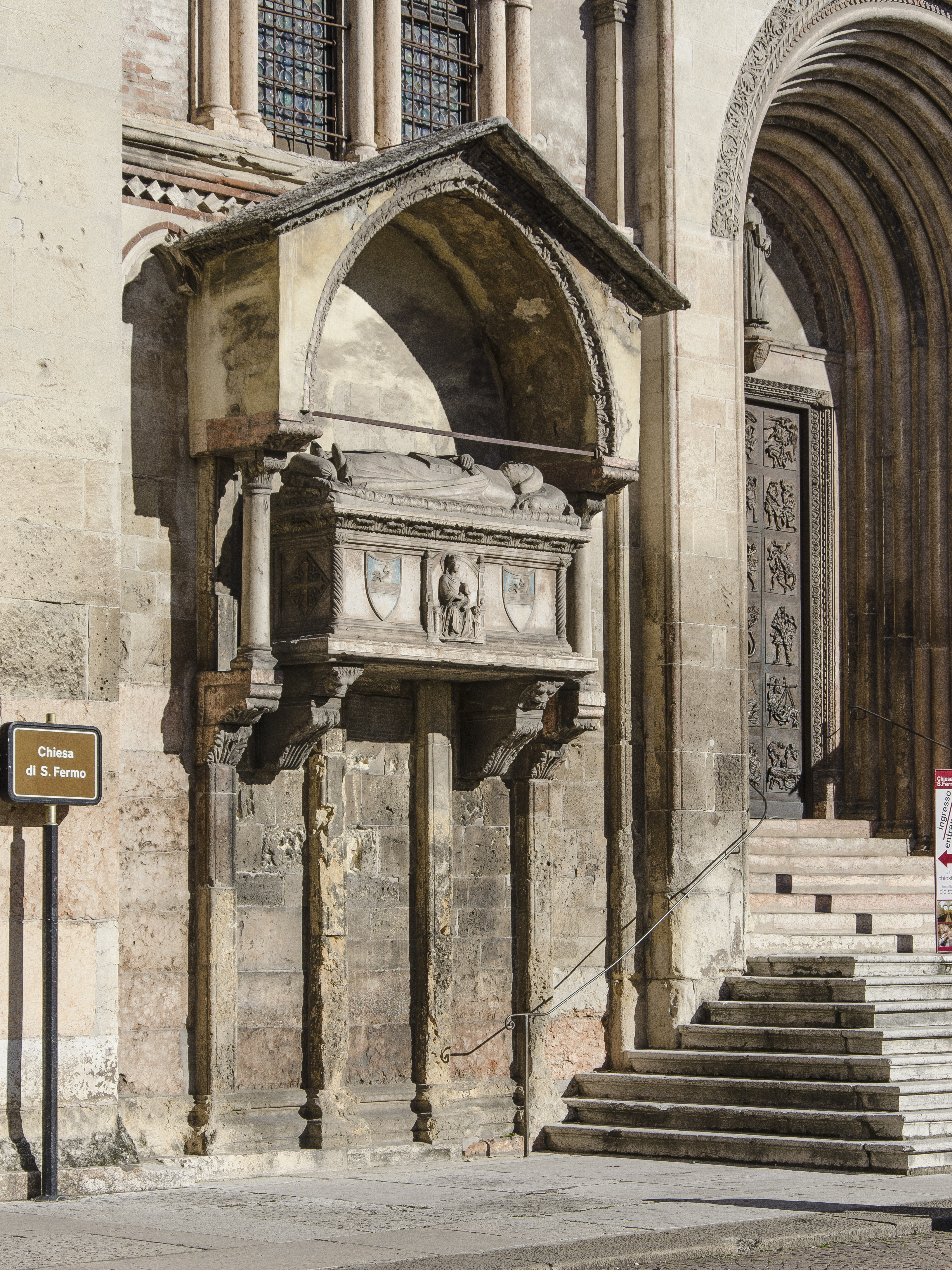 Fotografia dell'esterno